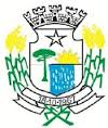 Brasão oficial da cidade de Quedas do Iguaçu.